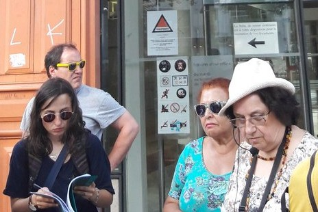 L'historienne Hélène Échinard, spécialiste des femmes de Marseille, raconte en sortie avec Ancrages